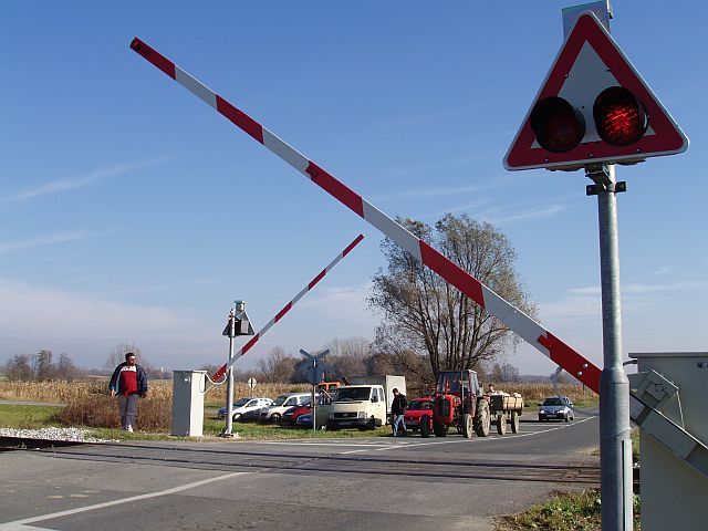 ŽCPR Virje - Molve na pruzi Koprivnica - Virovitica